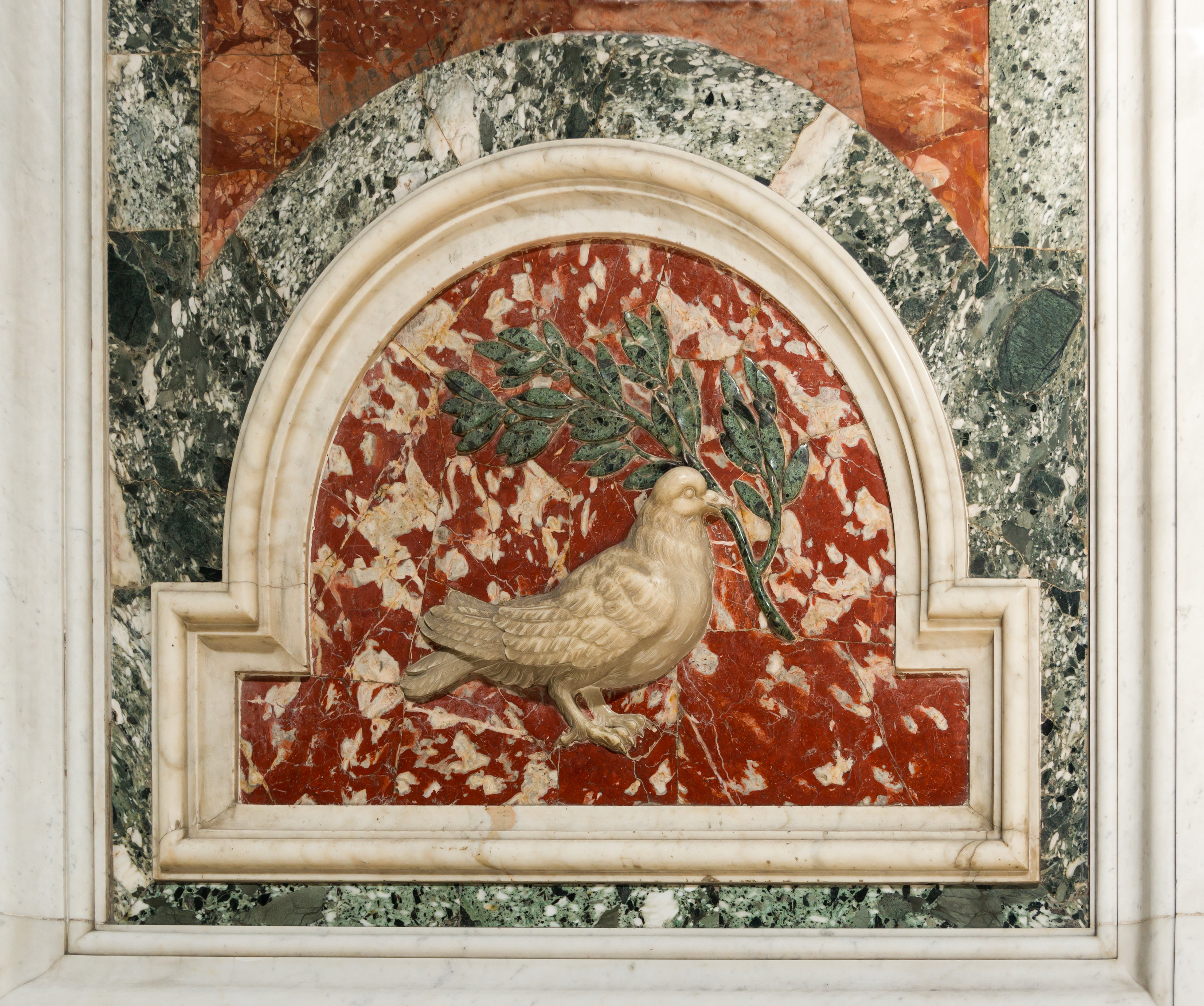 La colombe de Noé, bas-relief, Basilique Saint-Pierre, Cité du Vatican